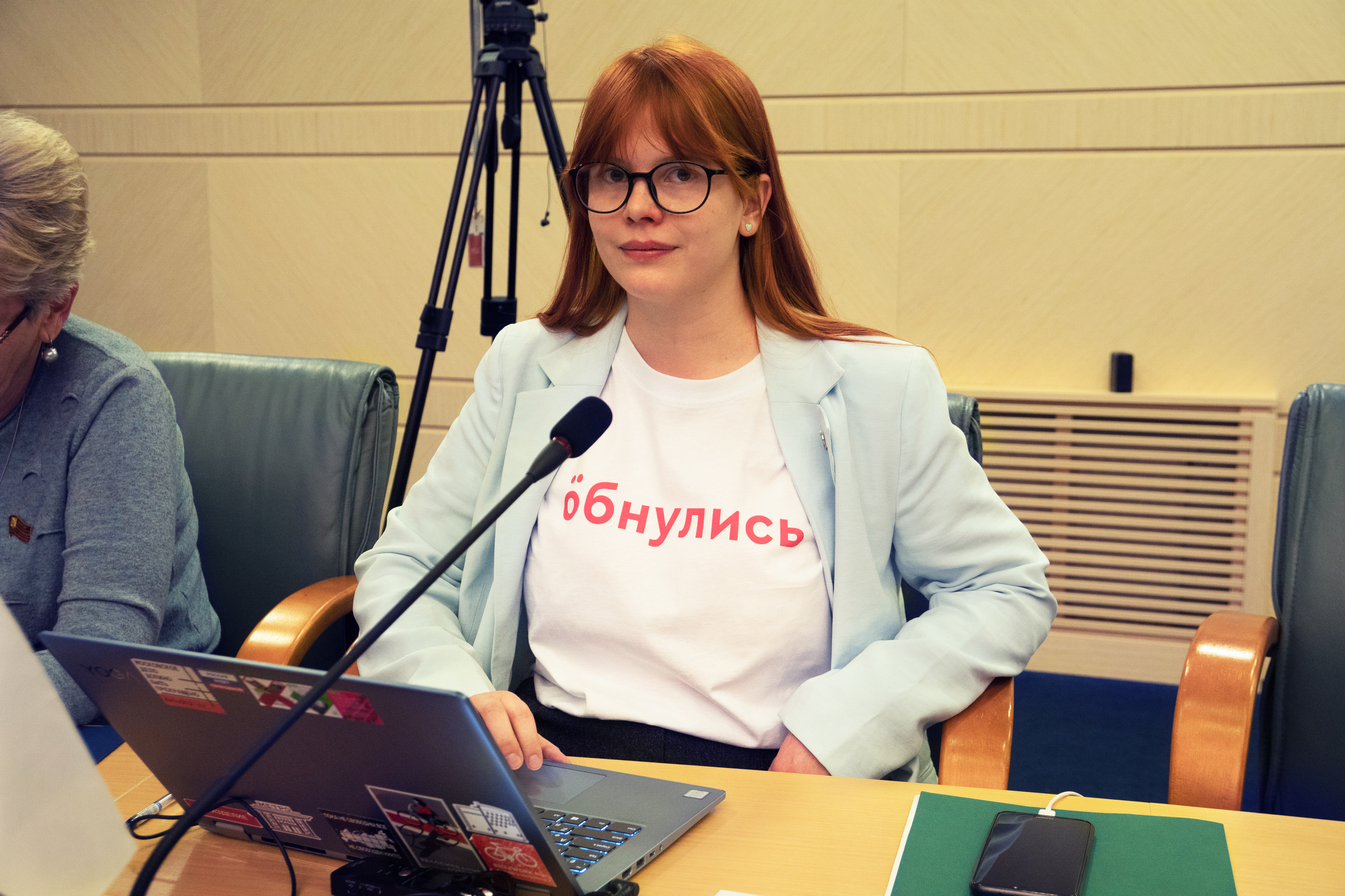 Дарья Беседина на заседании Мосгордумы по одобрению поправок в конституцию